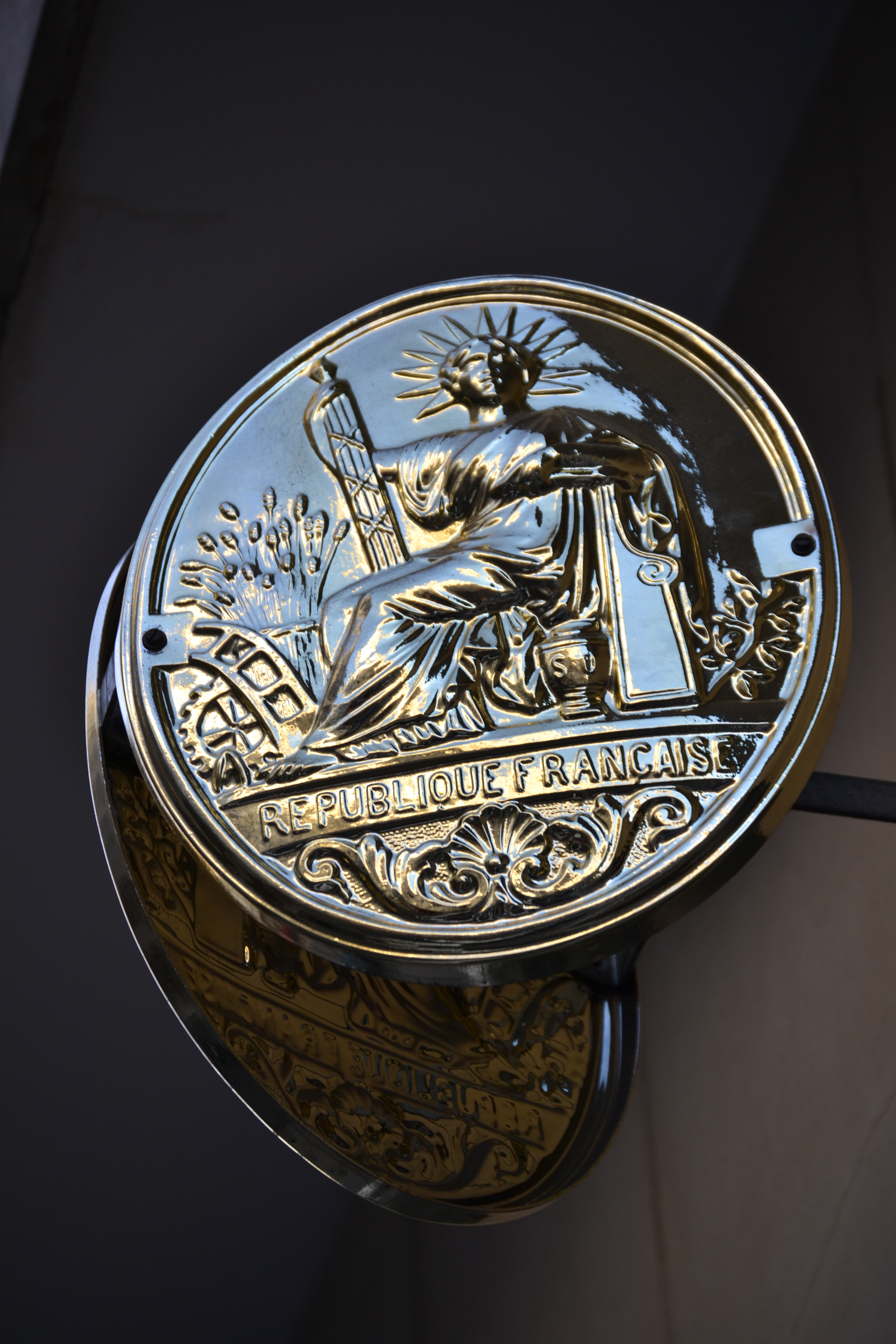 Insigne de notaire parisien situé Rue Berthollet.